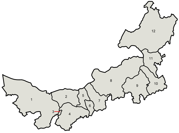 A Inner Mongolia Map